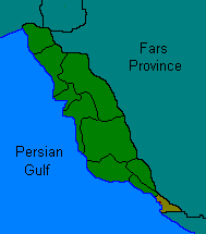 نقشه شهرستان عسلویه